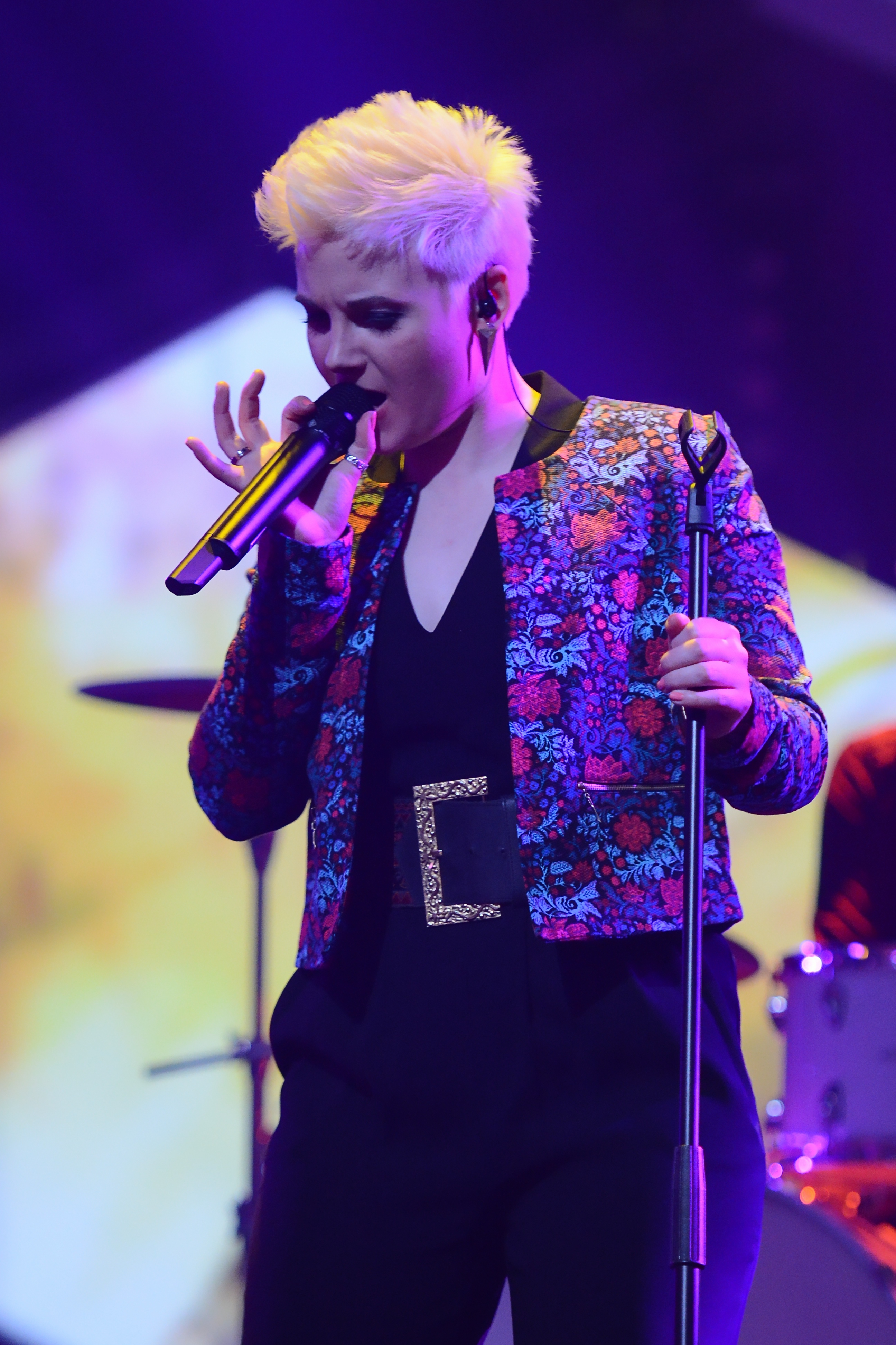 Elaiza bei Unser Song für Dänemark 2014 in Köln.